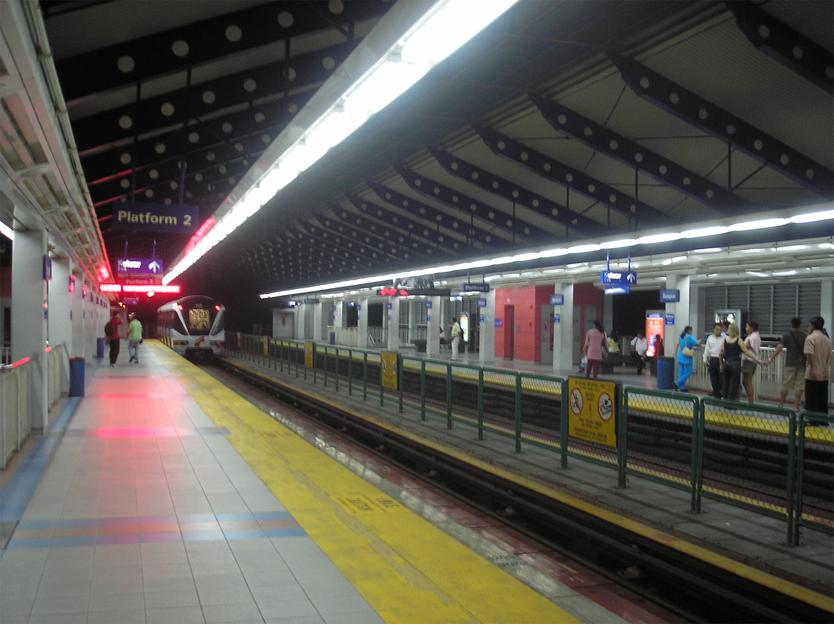 The Bangsar LRT station (Kelana Jaya Line), Kuala Lumpur, Malaysia.